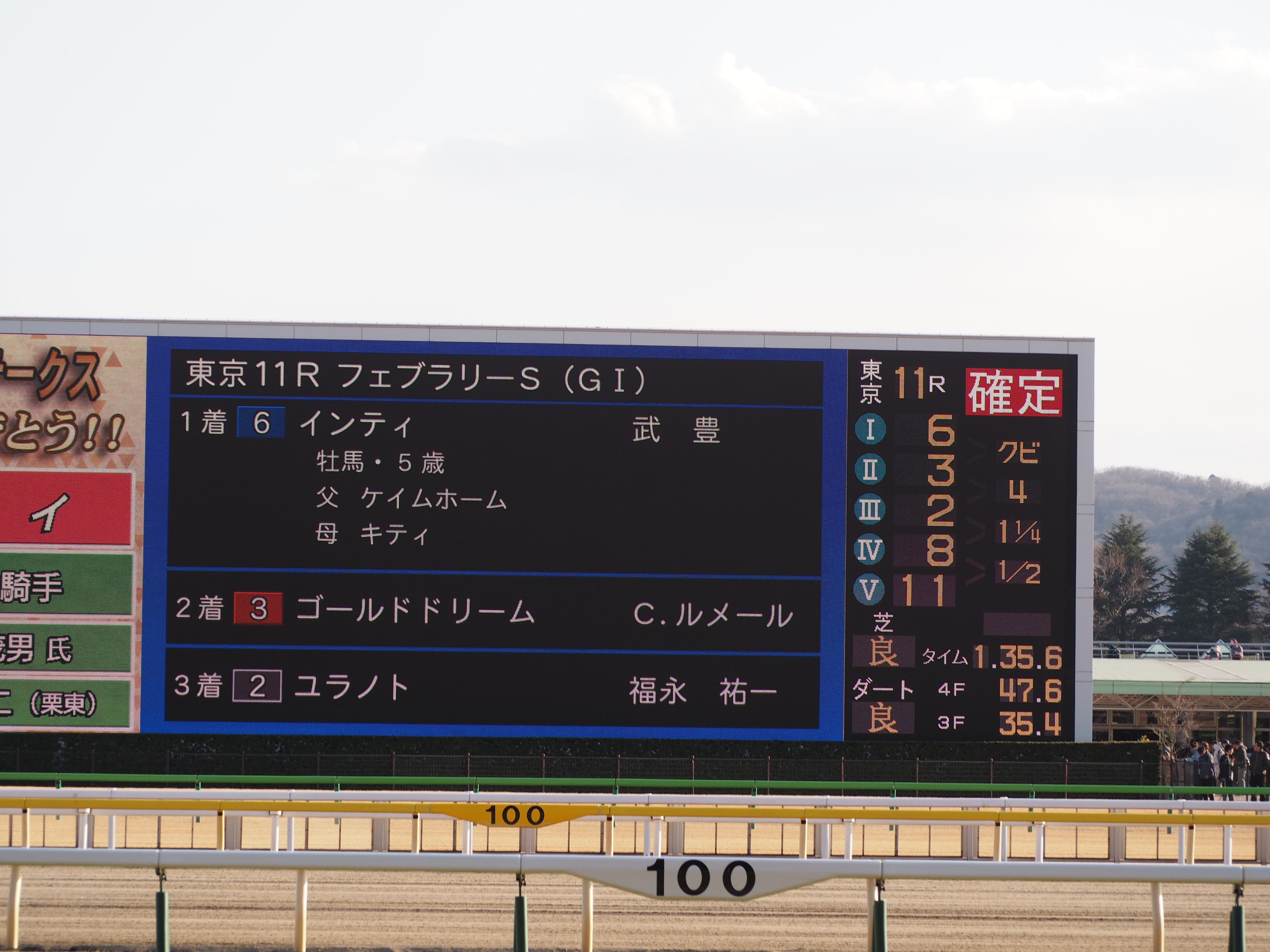 february stakes / フェブラリーステークス